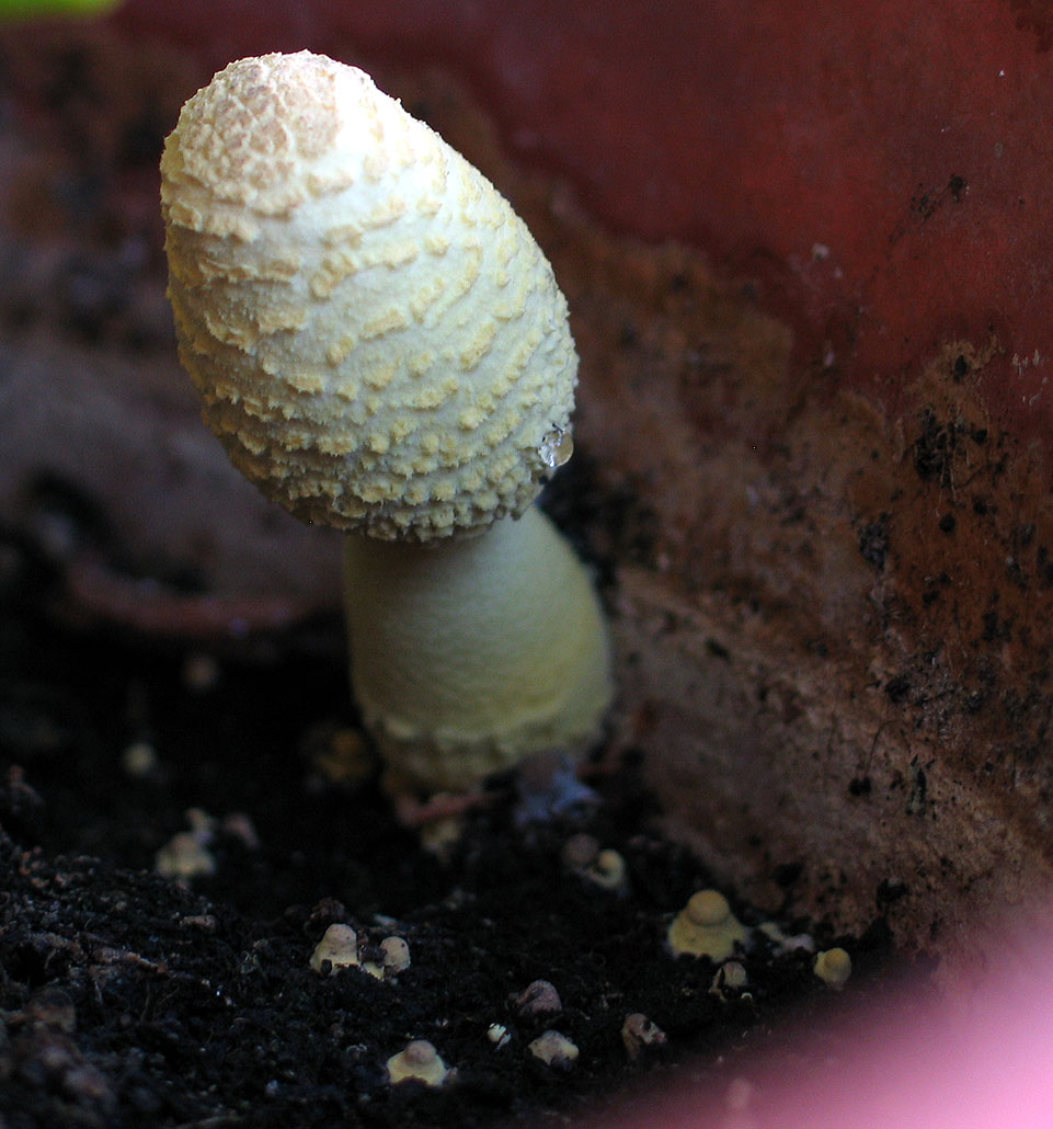 Gelber Faltenschirmling (lat. Leucocoprinus birnbaumii) in seinem (in mitteleuropäischen Breiten) natürlichen Umfeld 'Blumentopf'